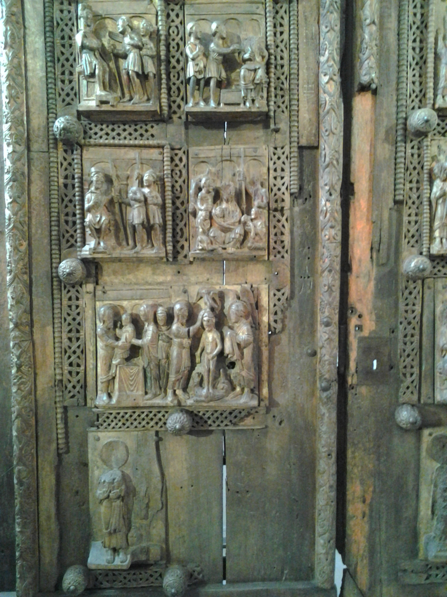 Linker Türflügel mit den unteren Tafeln